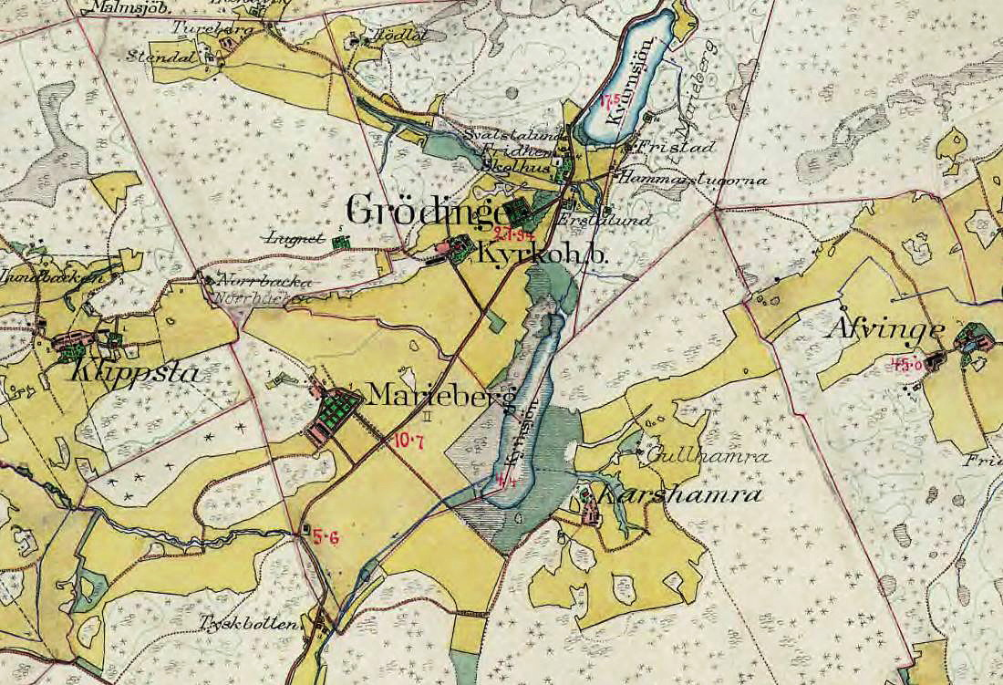 Grödinge kyrka, Marieberg, Karshamra och Klippsta på Häradsekonomiska kartan